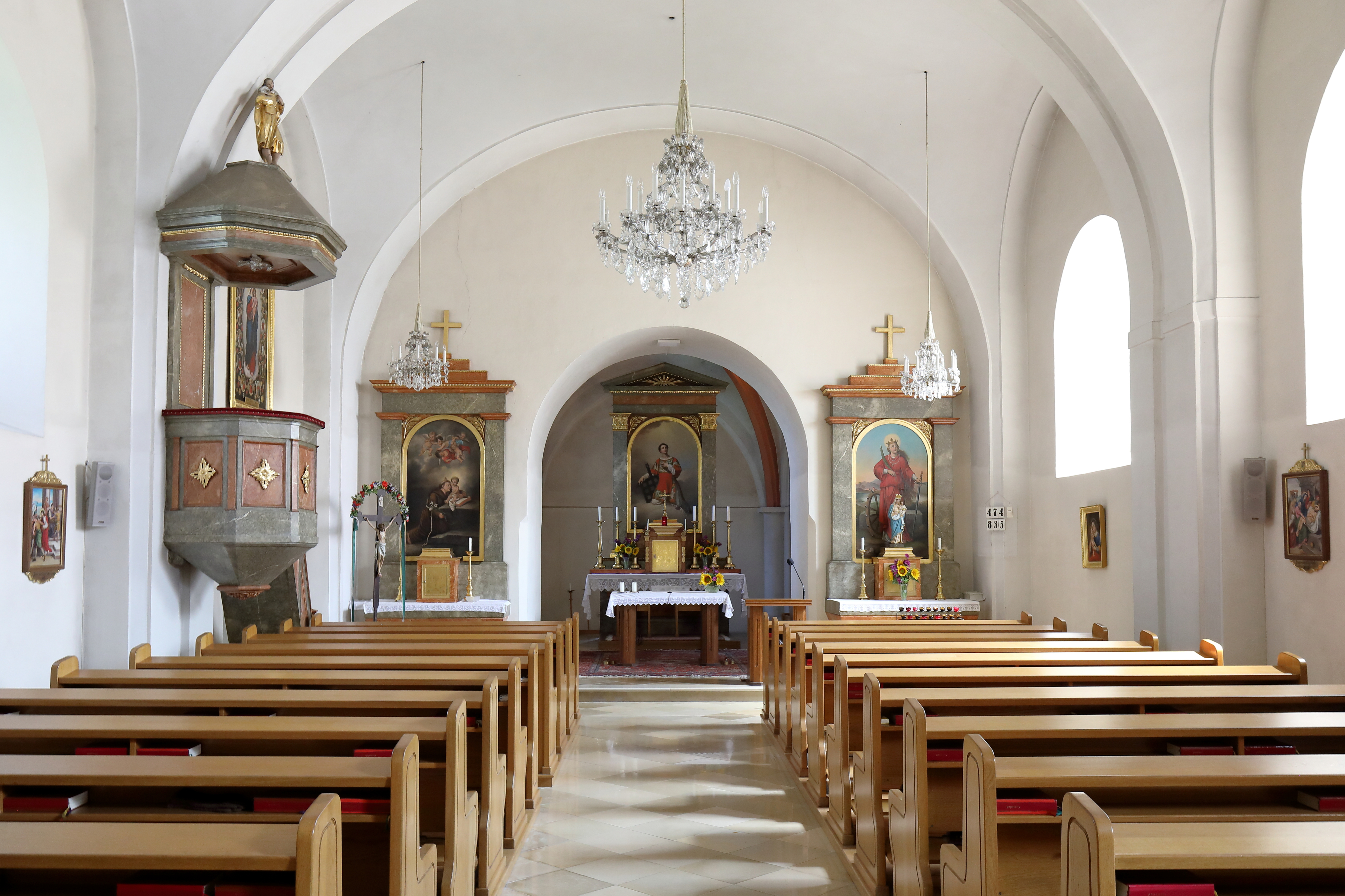 Innenansicht der röm.-kath. Pfarrkirche hl. Laurenz in der niederösterreichischen Gemeinde Haringsee. Die ehemalige Wehrkirche wurde in mehreren Etappen barockisiert und Anfang des 19. Jahrhundert gegen Westen um ein Joch erweitert.